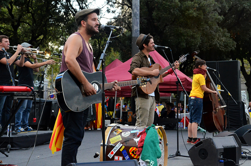 Concert d'Els Catarres. La Via Catalana a Barcelona. Plaça Catalunya.